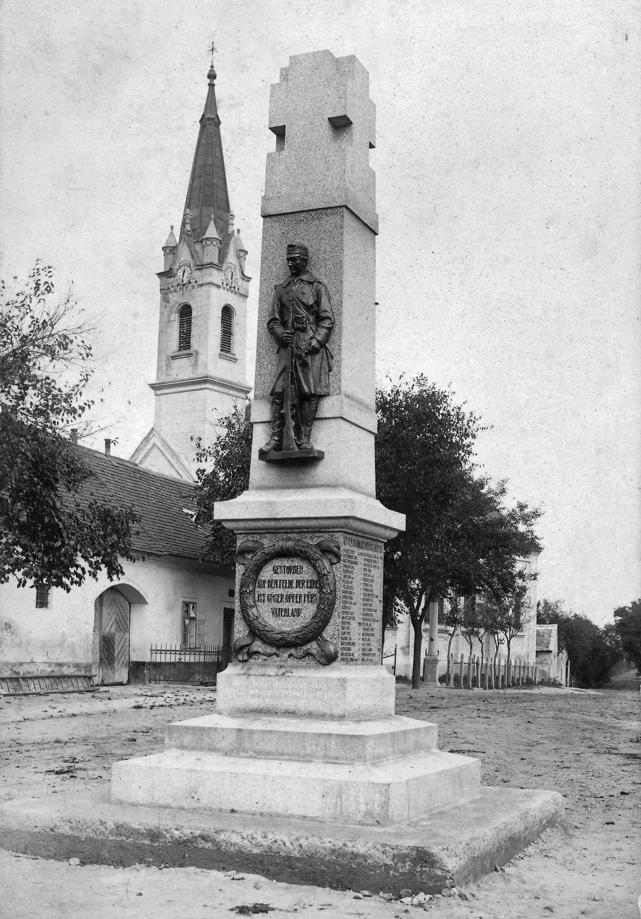 Mosonszentpéter (ekkor önálló, ma a város része), Rákóczi utca, I. világháborús emlékmű (Kallós Endre 1924.). Háttérben a Szent Péter római katolikus templom. Location: Hungary, Jánossomorja Tags: monument, church Title: Mosonszentpéter (ekkor önálló, ma a város része), Rákóczi utca, I. világháborús emlékmű (Kallós Endre 1924.). Háttérben a Szent Péter római katolikus templom.